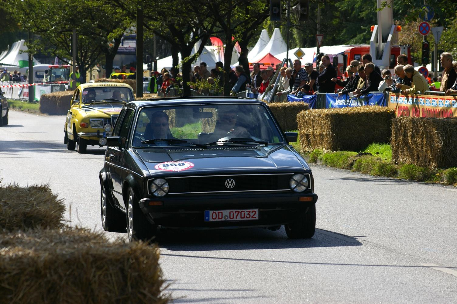 Nordstadt Golf 928, Stadtparkrennen Hamburg 2007